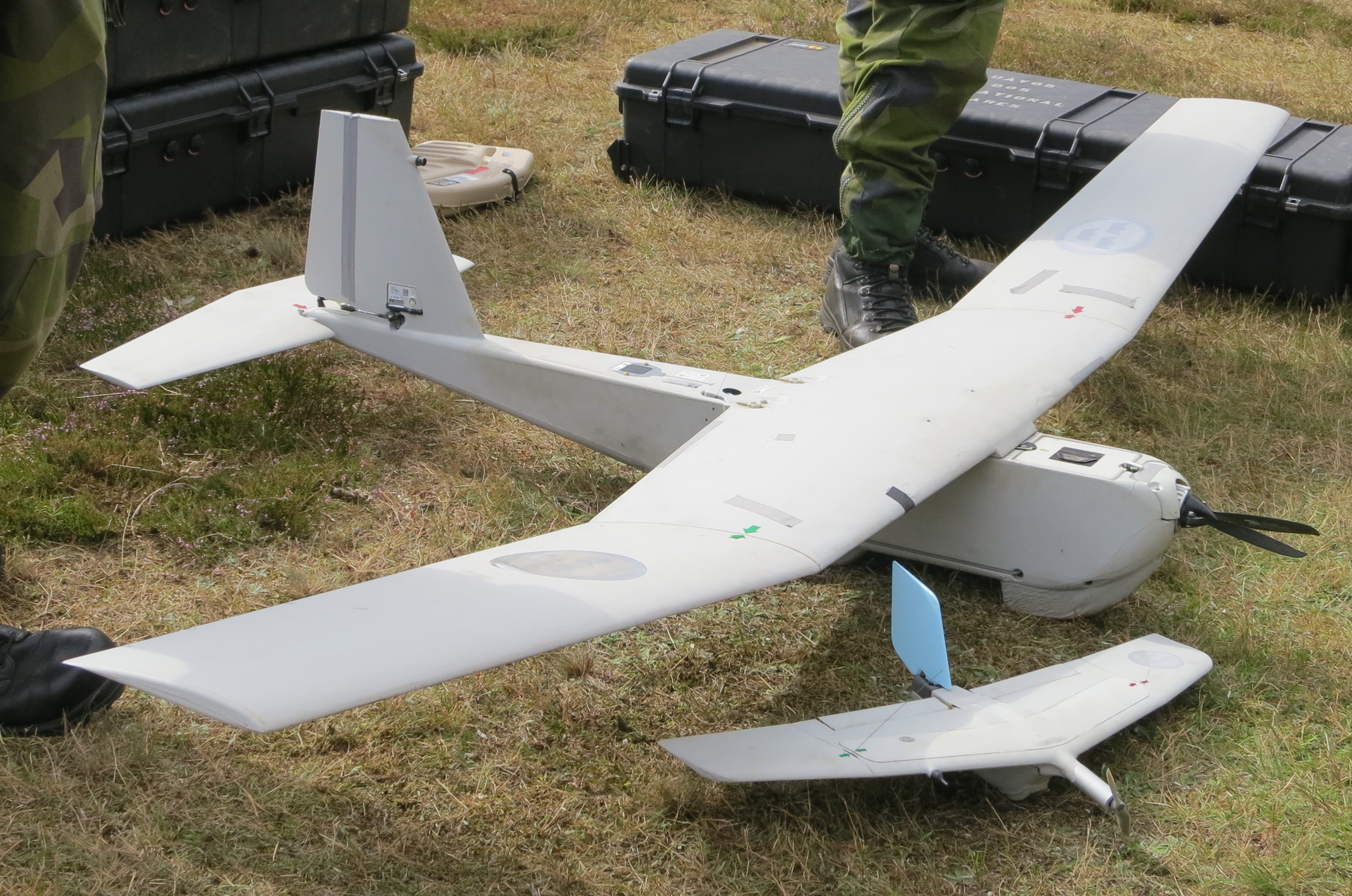 UAV-er i svenska armén